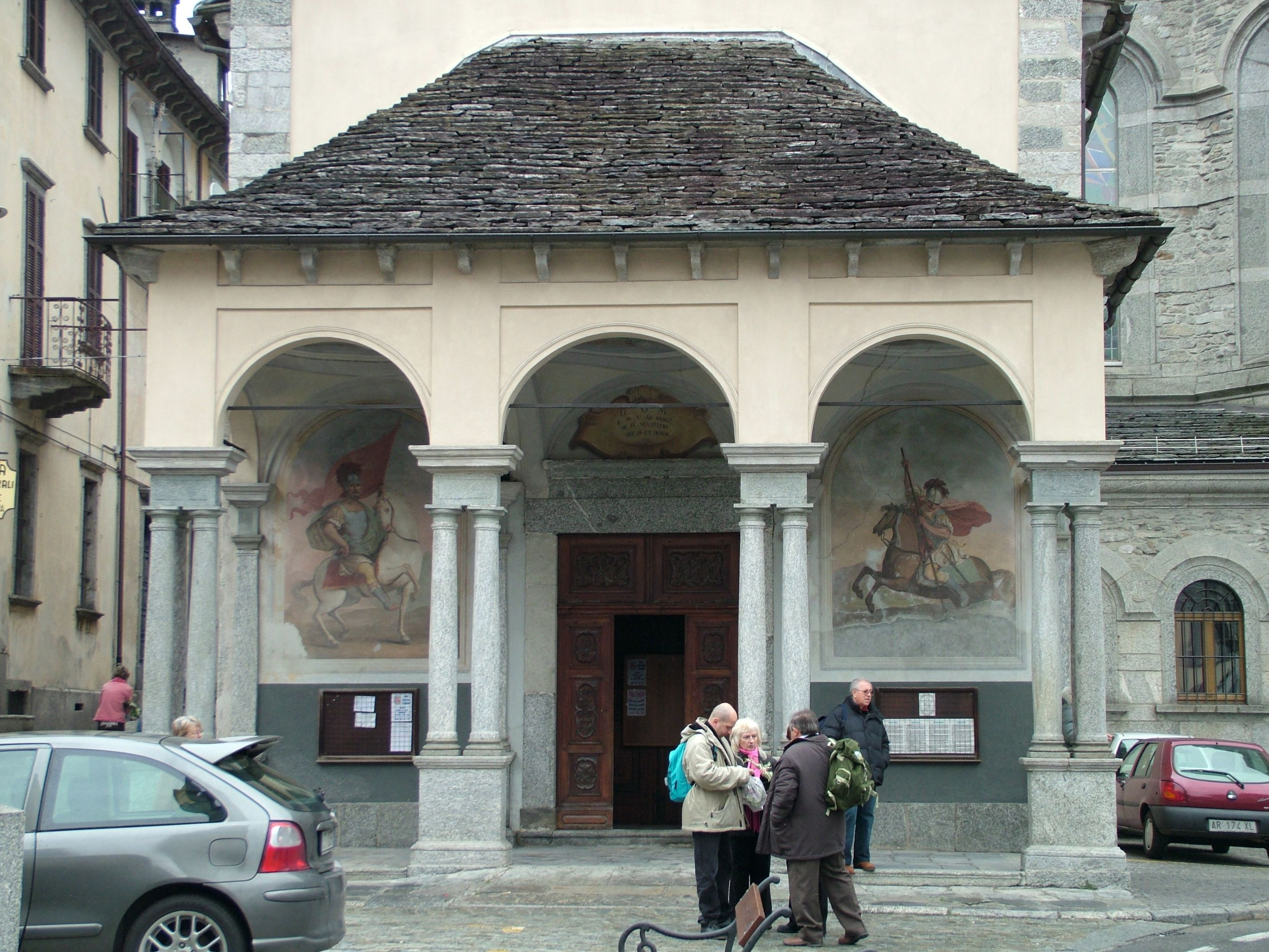 Re, Piemont, Italien, der Eingang der Wallfahrtkirche zu der Kapelle mit dem Madonnenbild